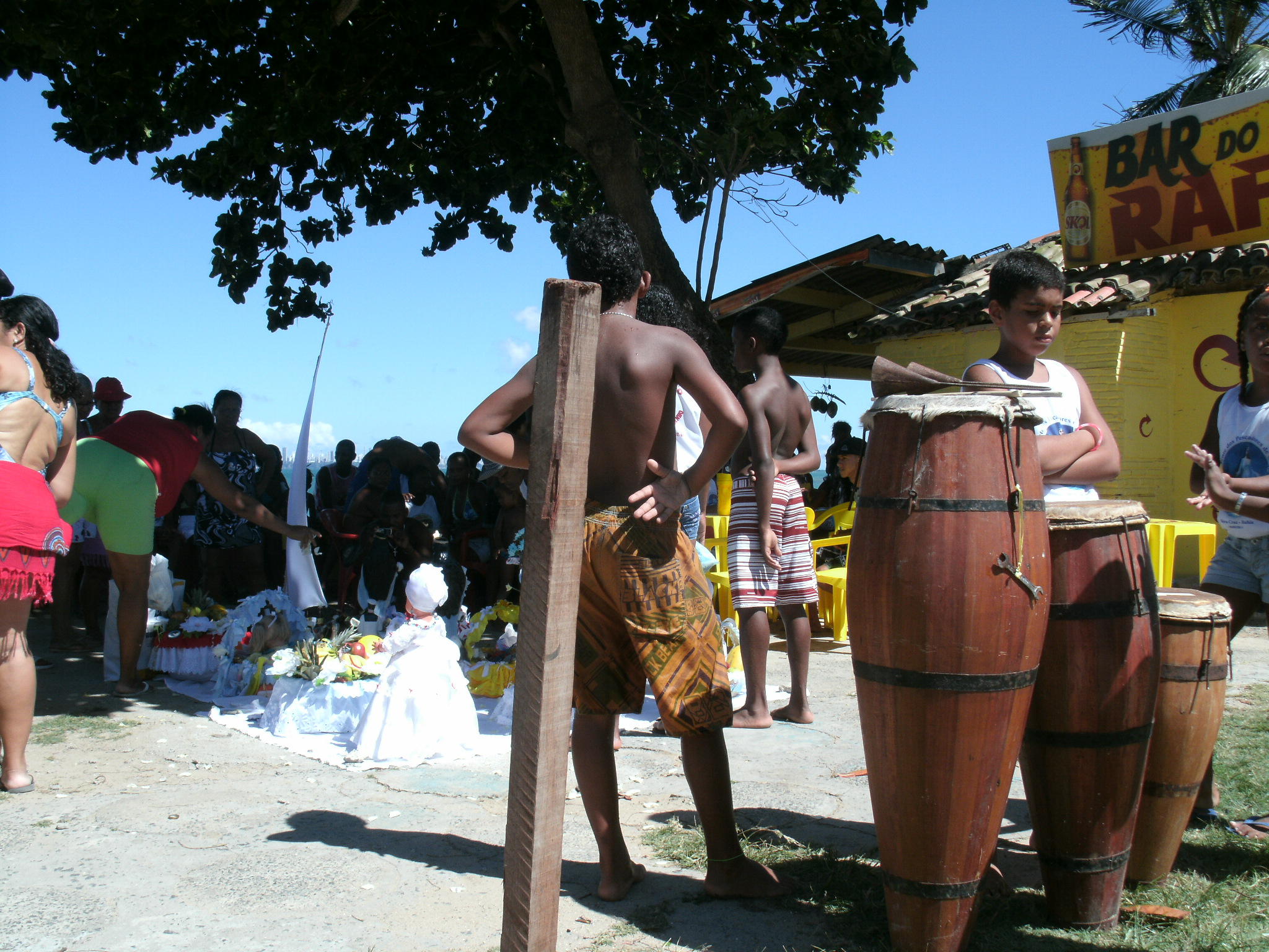 Tambours pour la fête de Lemanjá à Santa Cruz